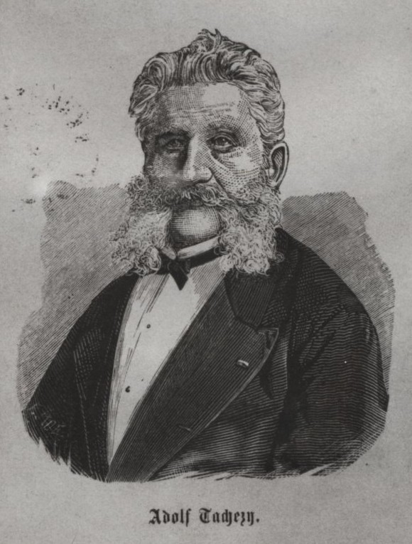 Leopold Adolf Tachezy (1814 - 19892), Český politik a starosta Chebu .